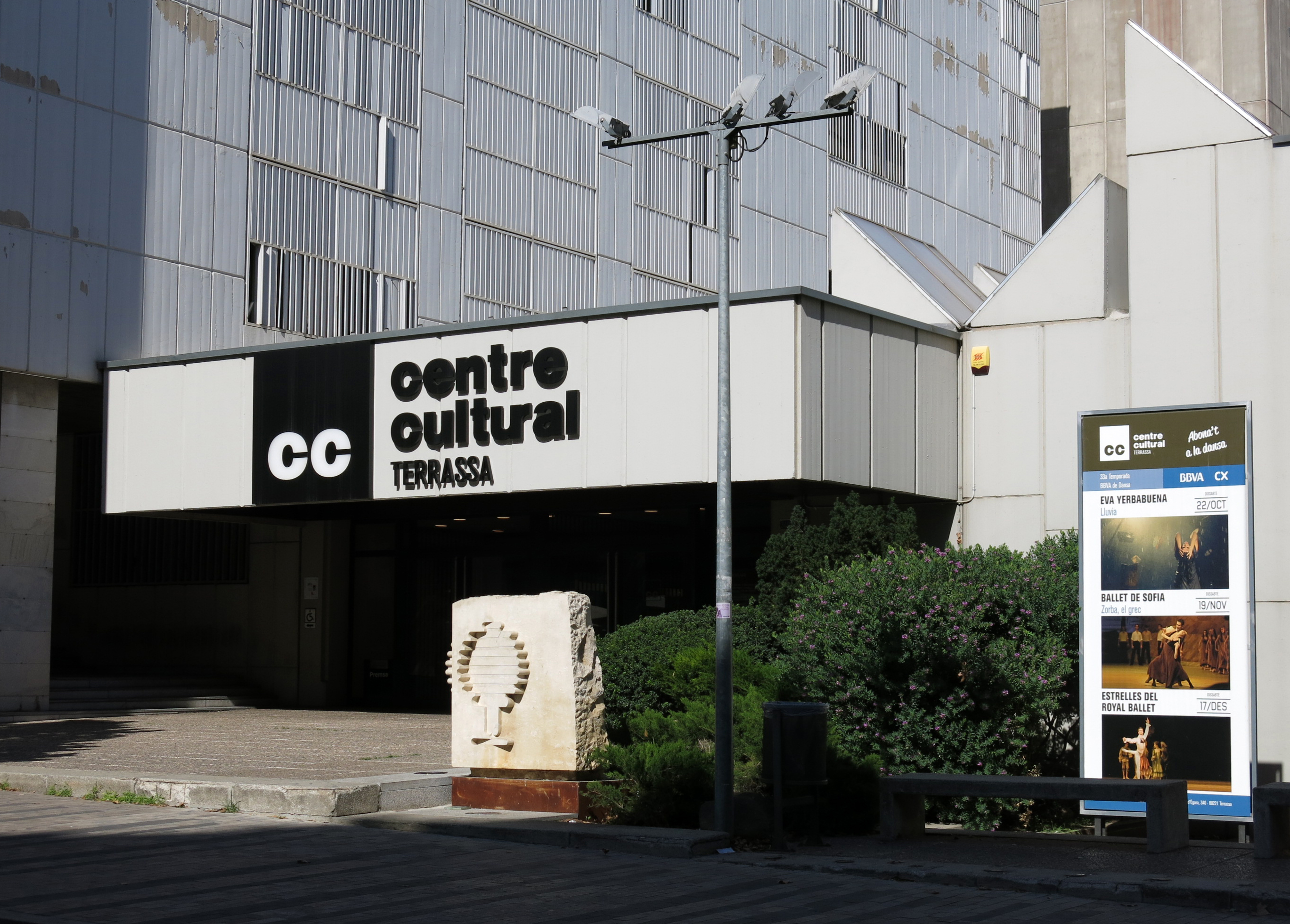 Centre Cultural de la Caixa de Terrassa (Terrassa)